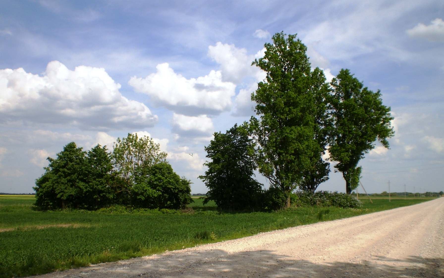 Dembnė, buvusios sodybos vieta, Kėdainių raj.